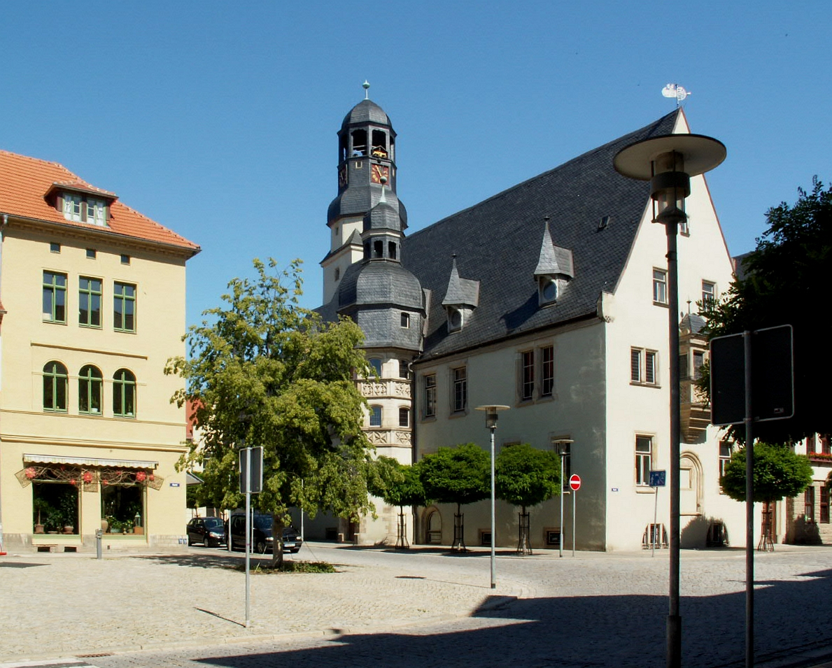 Rathaus in Aschersleben